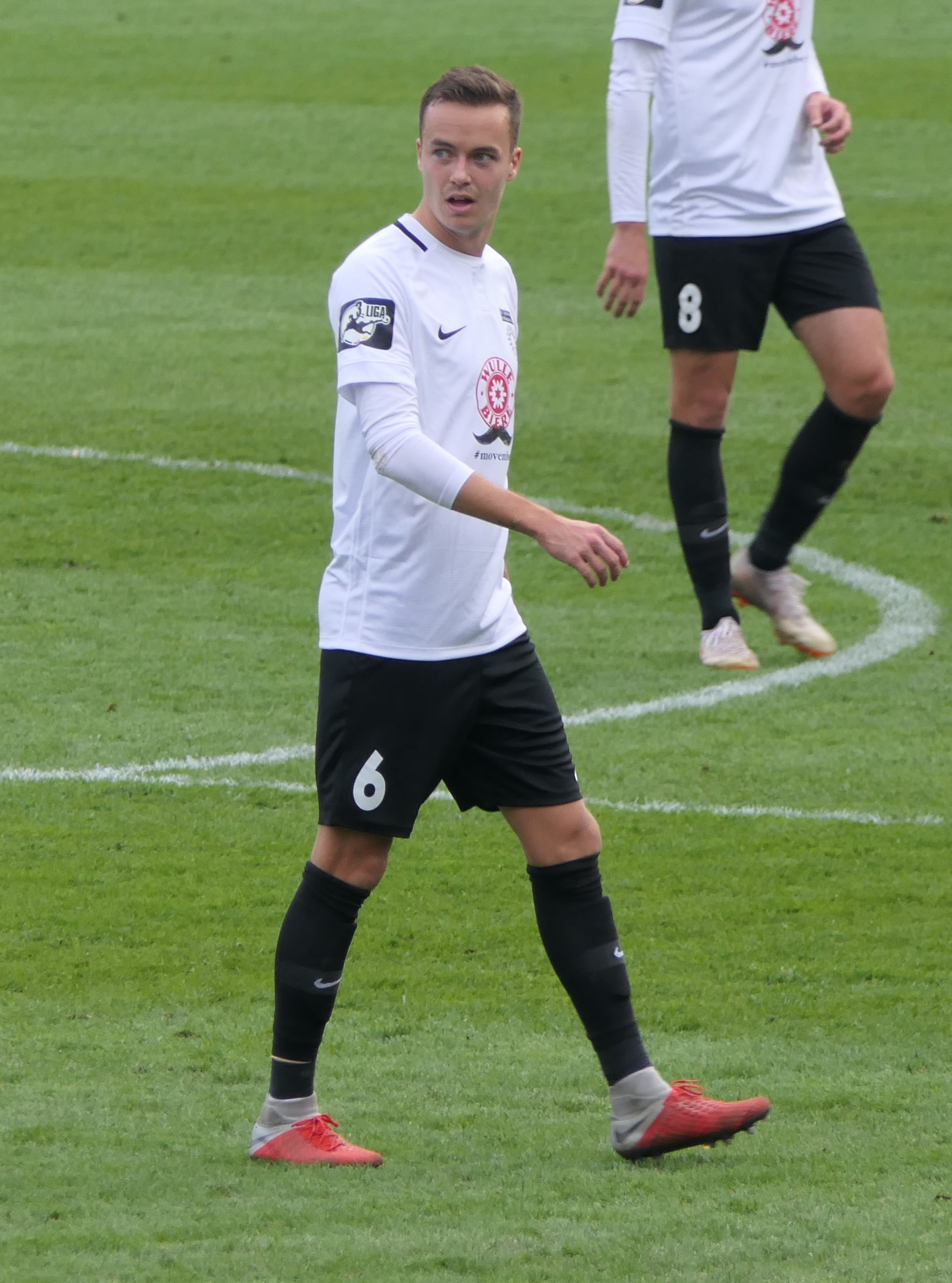 Der Fussballprofi Sebastian Bösel im Trikot der SG Sonnenhof Großaspach beim Heimspiel gegen Eintracht Braunschweig am 03.11.2018.